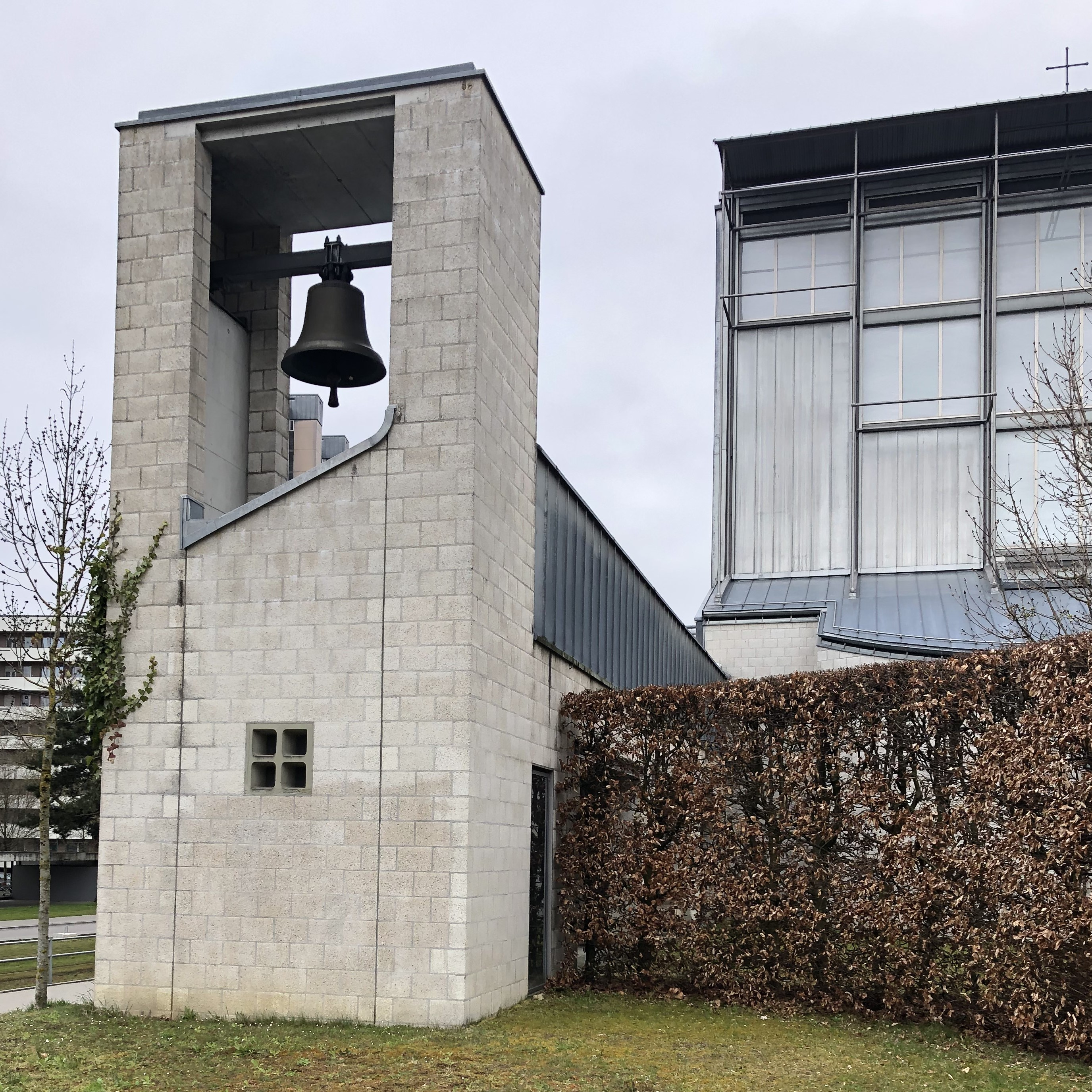 Ackerli Katholische Pfarrei St. Mauritius Glockenturm